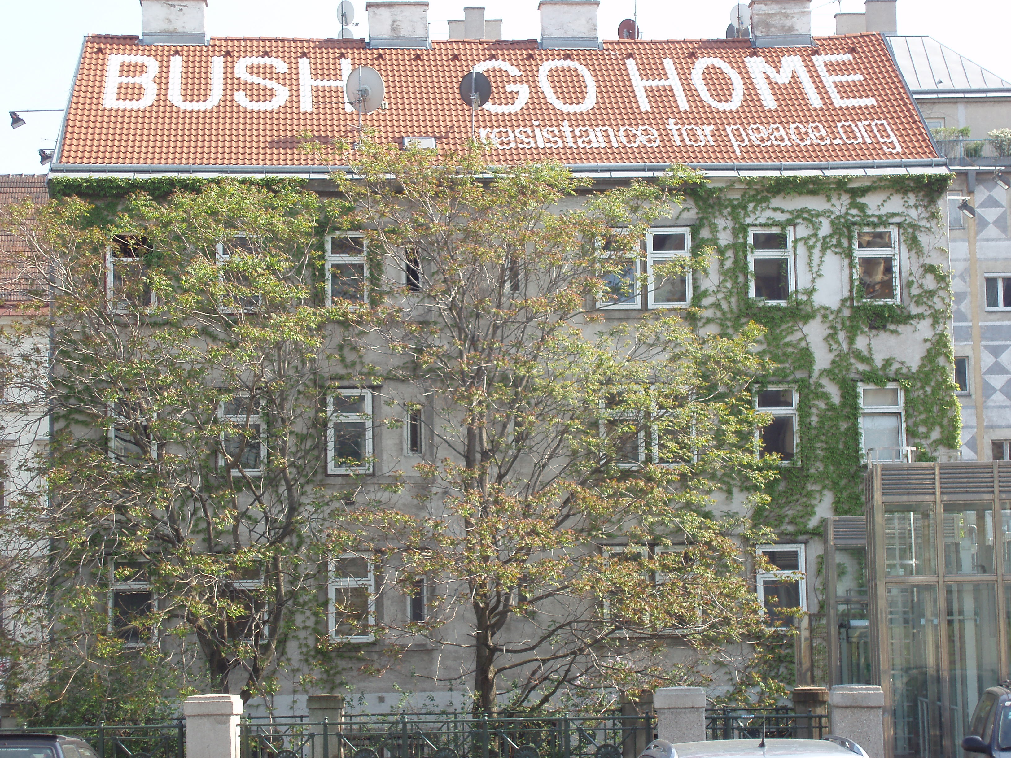 Vienna Rechte Wienzeile 2A